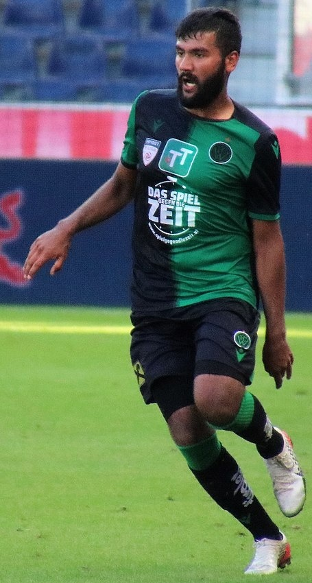 Ertugrul Yildirim